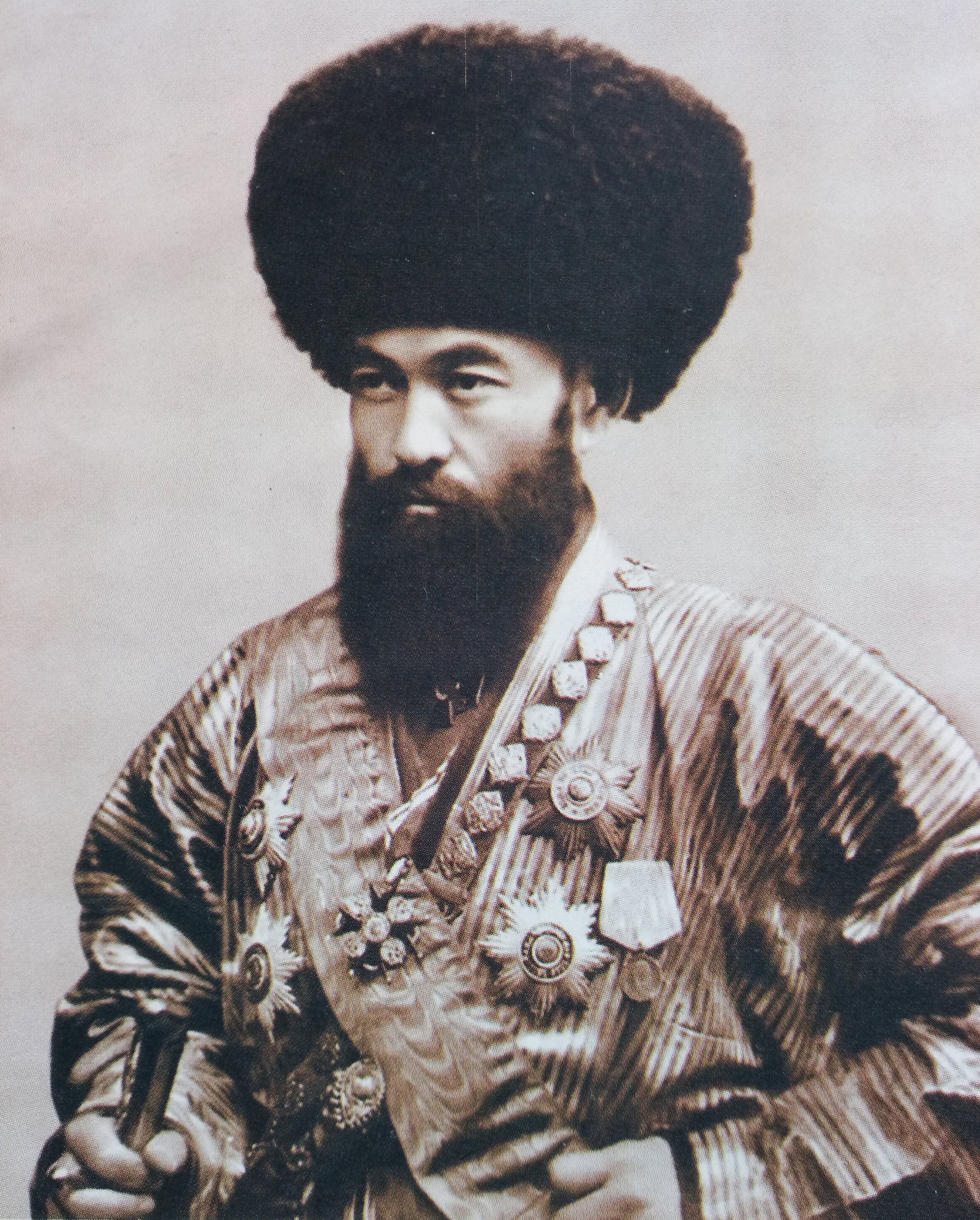 Said Islam Khodja, ermordet 1913, Wesir des Khanats Chiwa